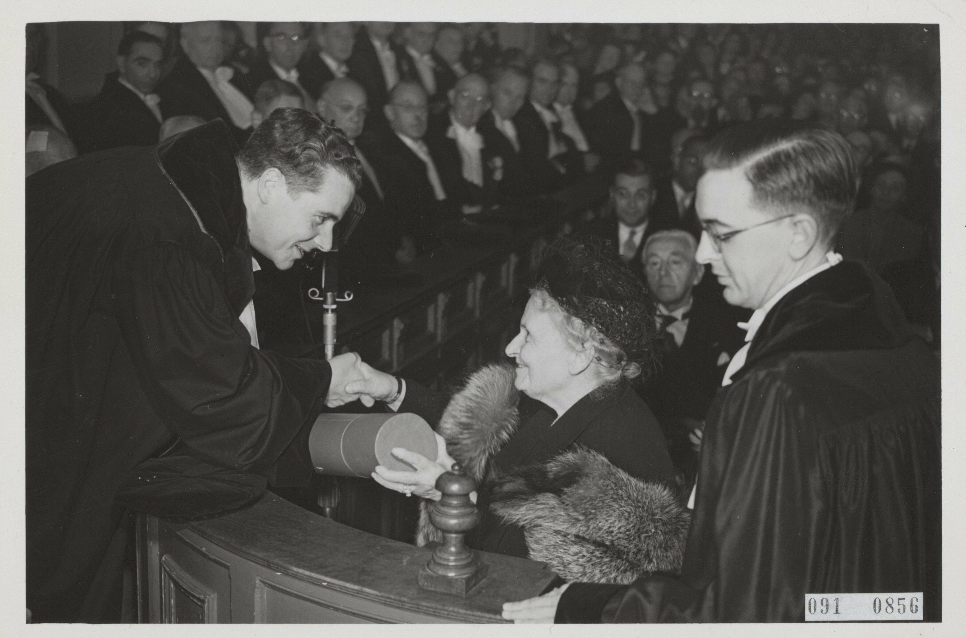 Collectie / Archief : Fotocollectie Elsevier Reportage / Serie : [ onbekend ] Beschrijving : Eredoctoraat voor Maria Montessori van de Gemeentelijke Universiteit van Amsterdam. De bul wordt uitgereikt door prof. W.G. Vegting. In het publiek achter mevr. Montessori oud-minister G. Bolkestein, die ook een eredoctoraat ontving Datum : 18 september 1950 Locatie : Amsterdam, Noord-Holland Trefwoorden : eredoctoraten, onderwijs, universiteiten, vrouwen Persoonsnaam : Bolkestein, Gerrit, Montessori, Maria, Vegting, W.G. Fotograaf : Noske, J.D. / Anefo Auteursrechthebbende : Nationaal Archief Materiaalsoort : Foto (zwart/wit) Nummer archiefinventaris : bekijk toegang 2.24.05.02 Bestanddeelnummer : 091-0856